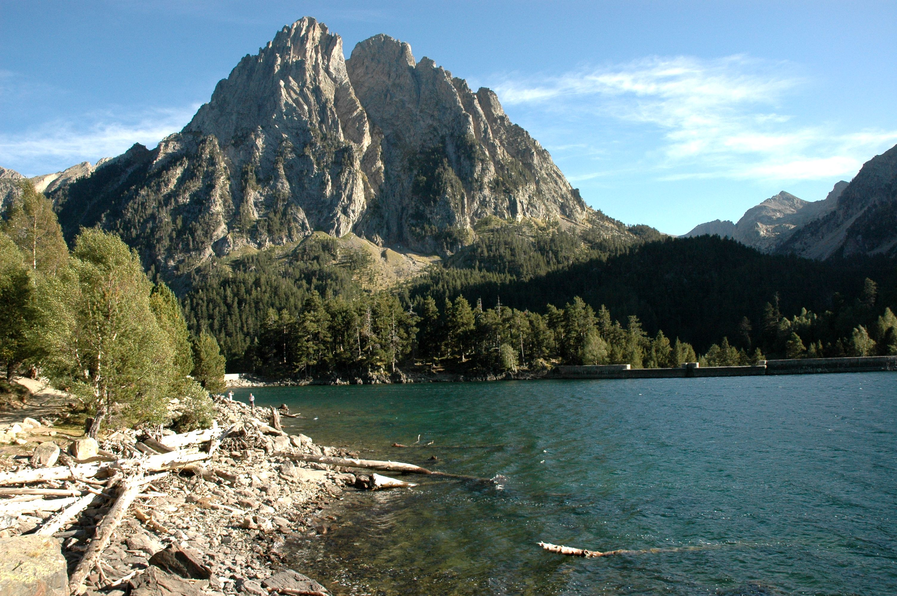 Estany de Sant Maurici